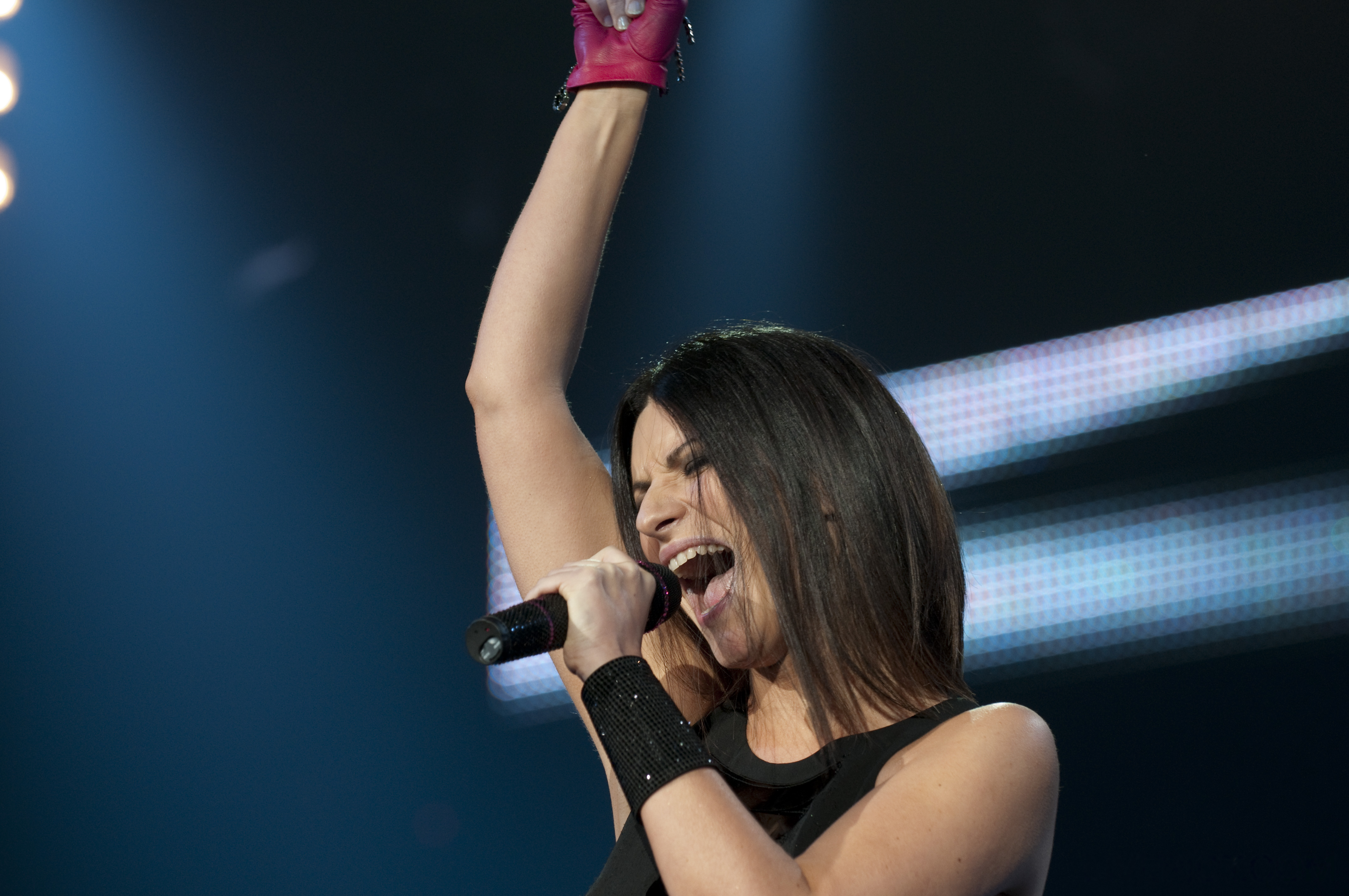 Laura Pausini